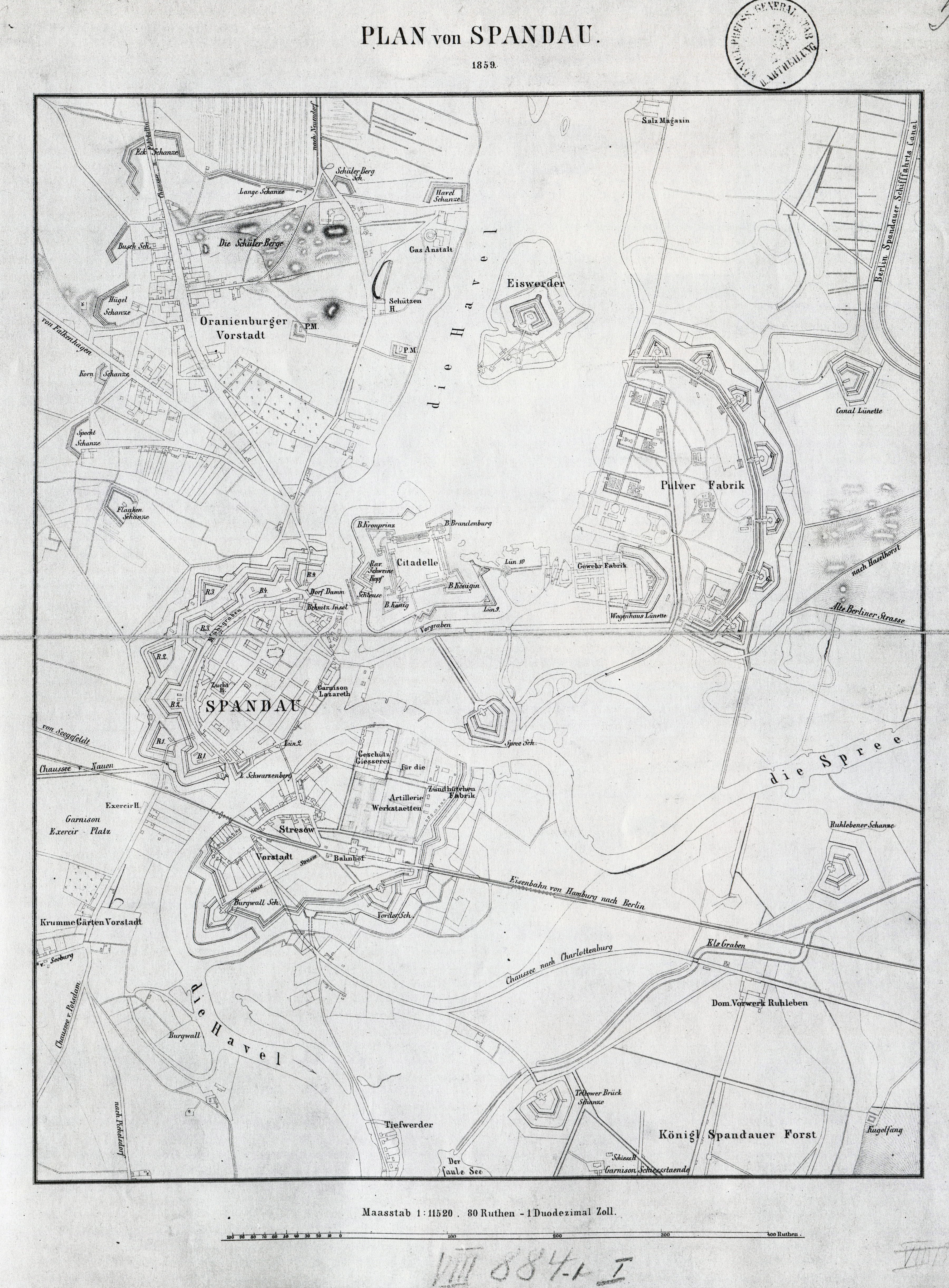 Die Karte zeigt sehr detailliert die Befestigungsanlagen Spandaus in der Mitte des 19. Jahrhunderts. Auf dem Stresow sind bereits per Hand die Gebäude der ab 1867 erbauten Artilleriewerkstätten nachgetragen.